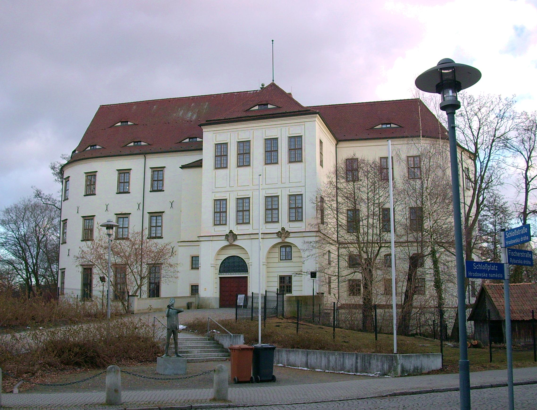 Schloss Hoyerswerda